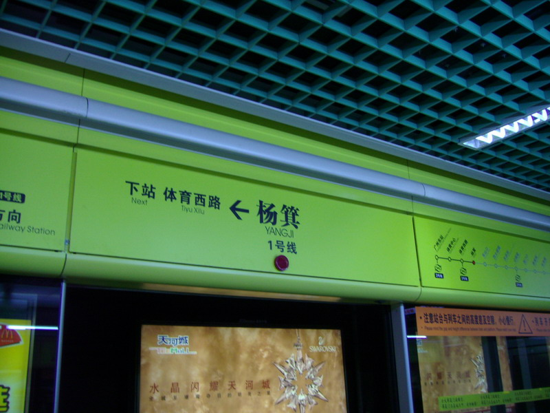 广州地铁杨箕站